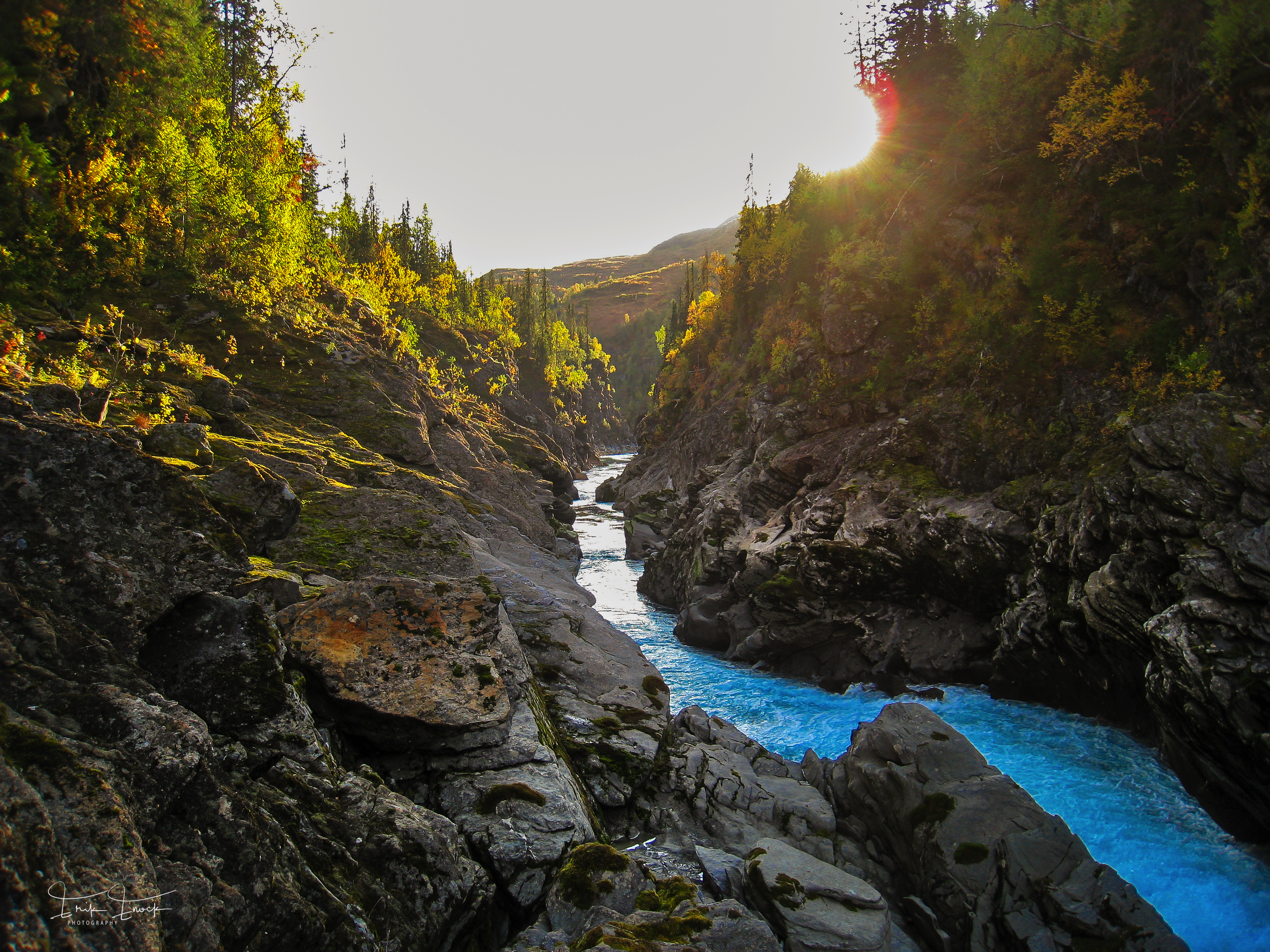 Elven som renner gjennom Marmorslottet